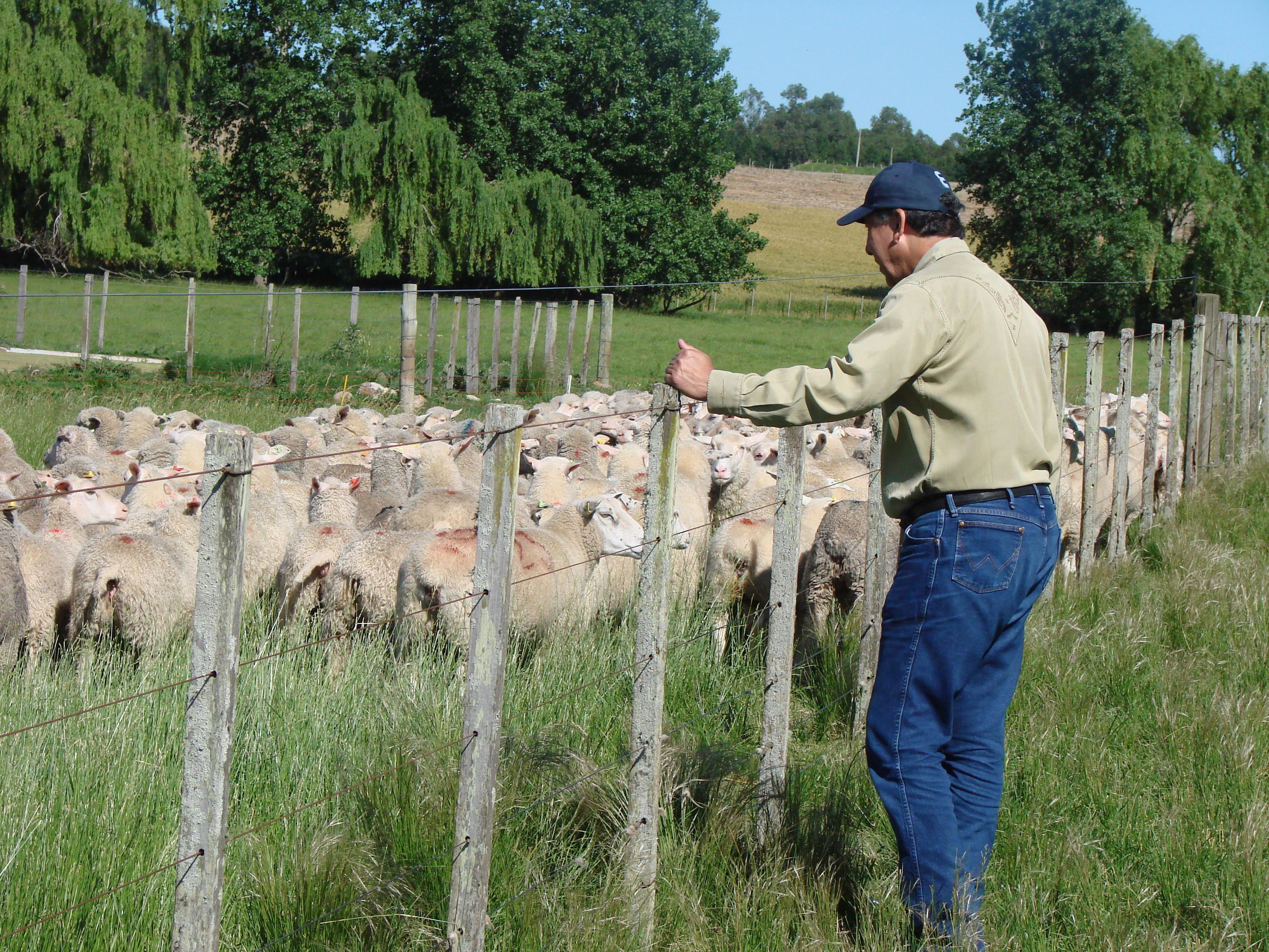 Rebaño de ovinos en el departamento de Colonia- Uruguay